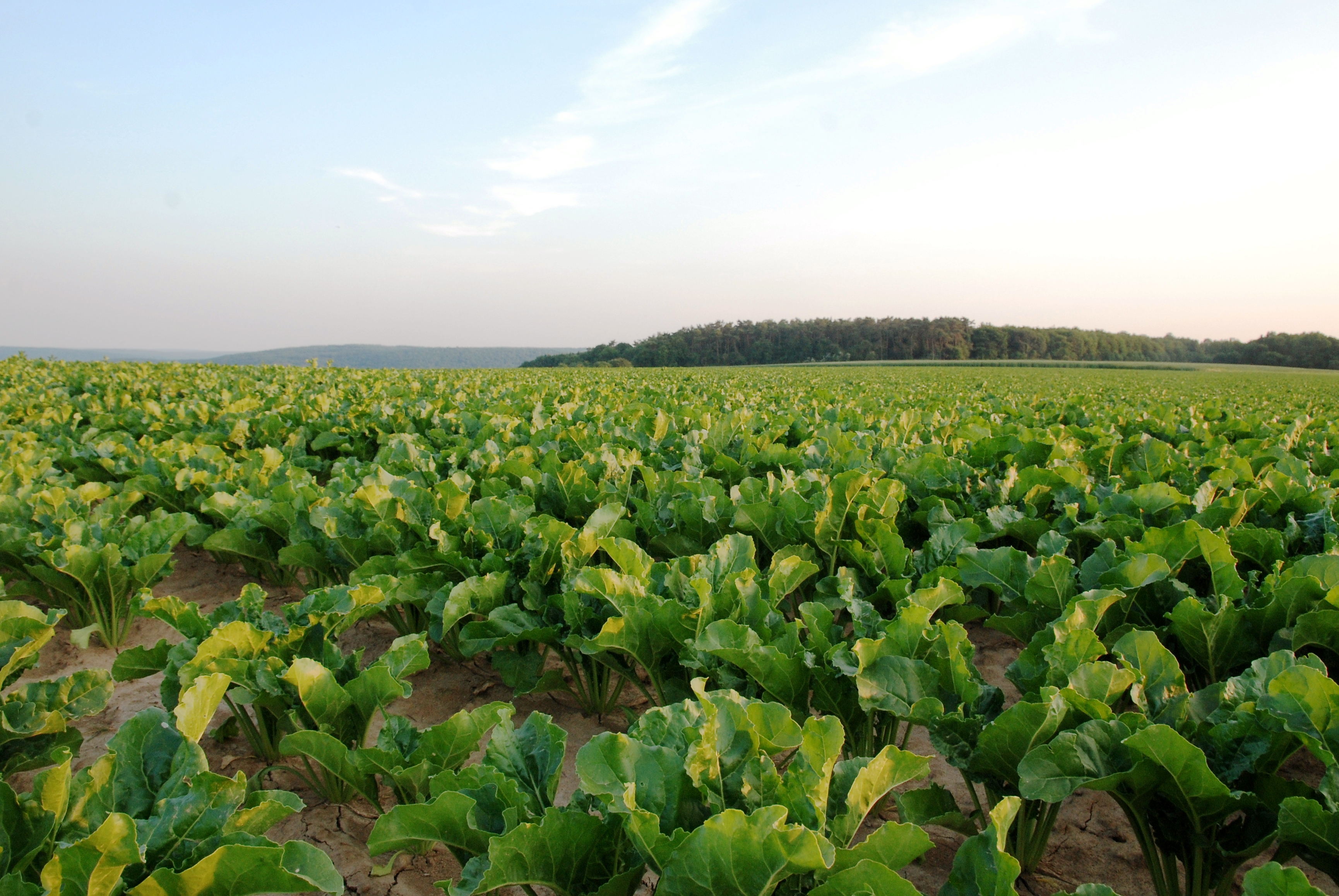 Sugar beet field